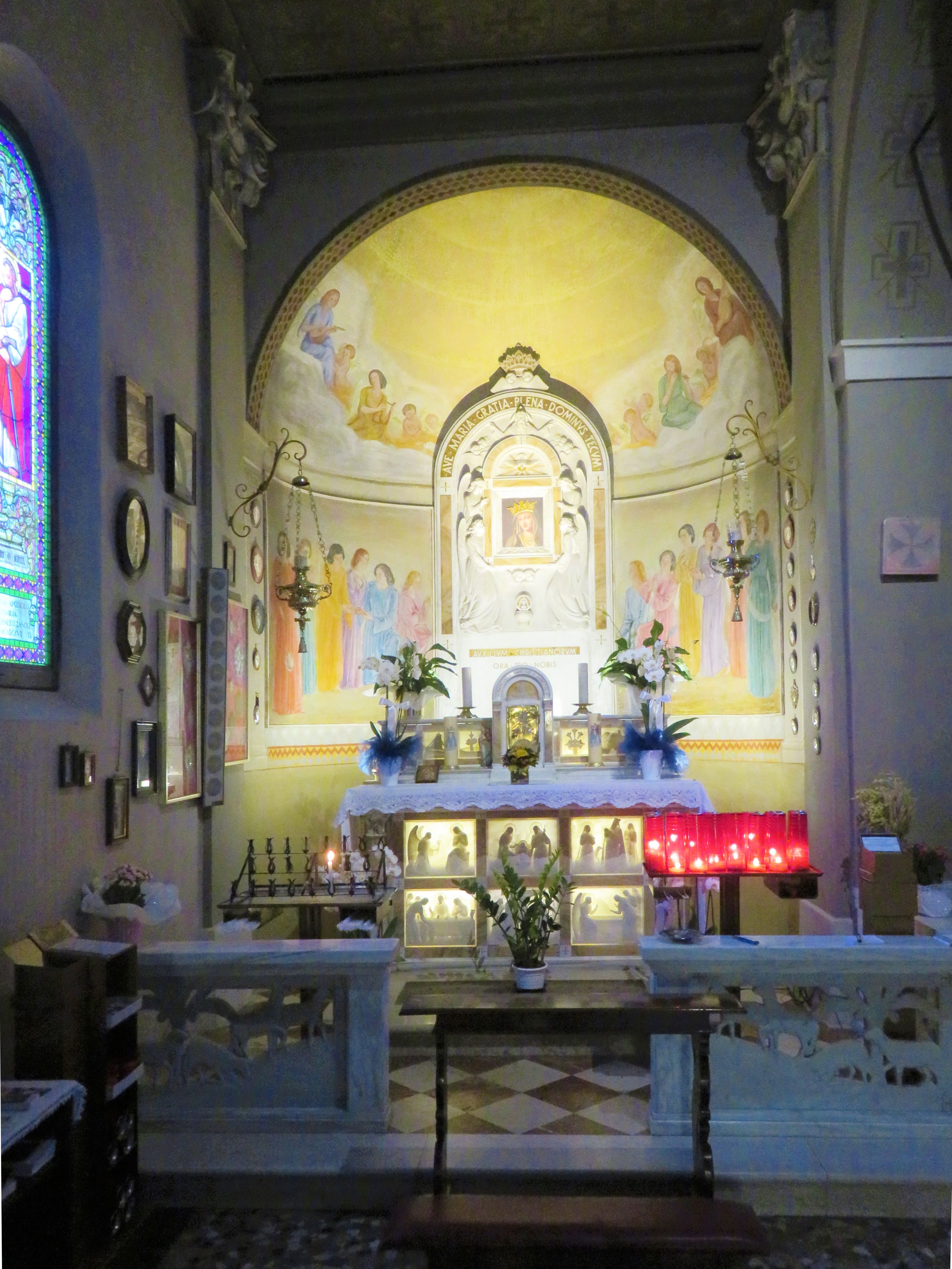 Chiesa dell'Invenzione della Santa Croce Carpi. Cappella-Santuario della Madonna dell'Aiuto.